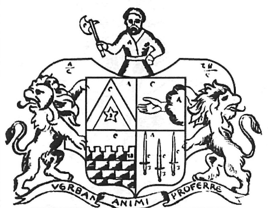 Blason de la famille von Daehn